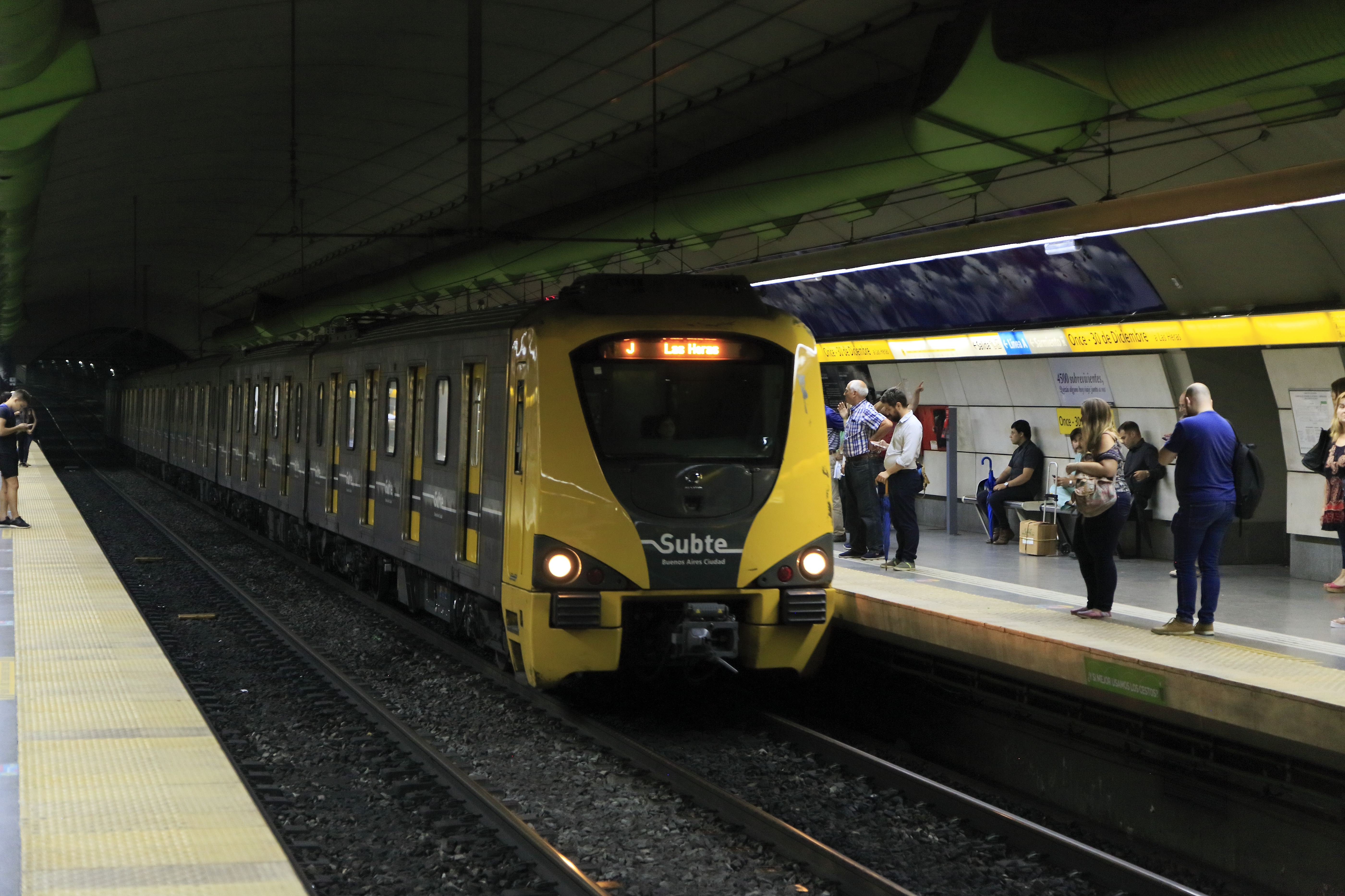 Zug nach Las Heras, die Einheit gehört zur Bauart Metropolis 300 von Alstom.